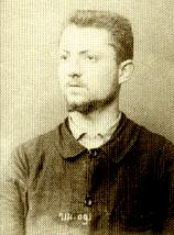 Henry Émile, imagem do anarquista terrorista